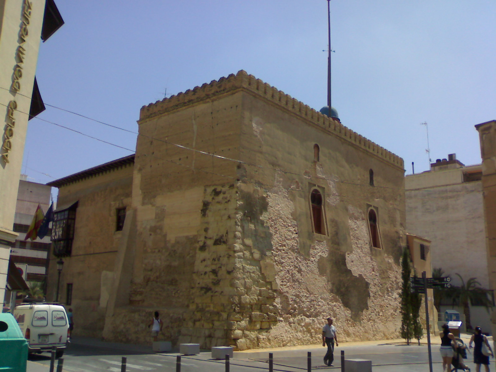 Torre de la Calahorra (Elche) desde la plaza del Congreso Eucarístico